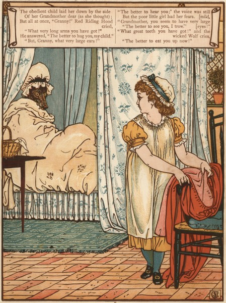 Гравюры по рисункам Крейна к сказкам «Синяя Борода», «Спящая Красавица», «Красная Шапочка», «Джек и бобовый стебель»